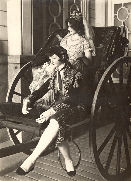 Fotografía. Instalación de la provincia de Madrid. Exposición del Traje Regional e Histórico.